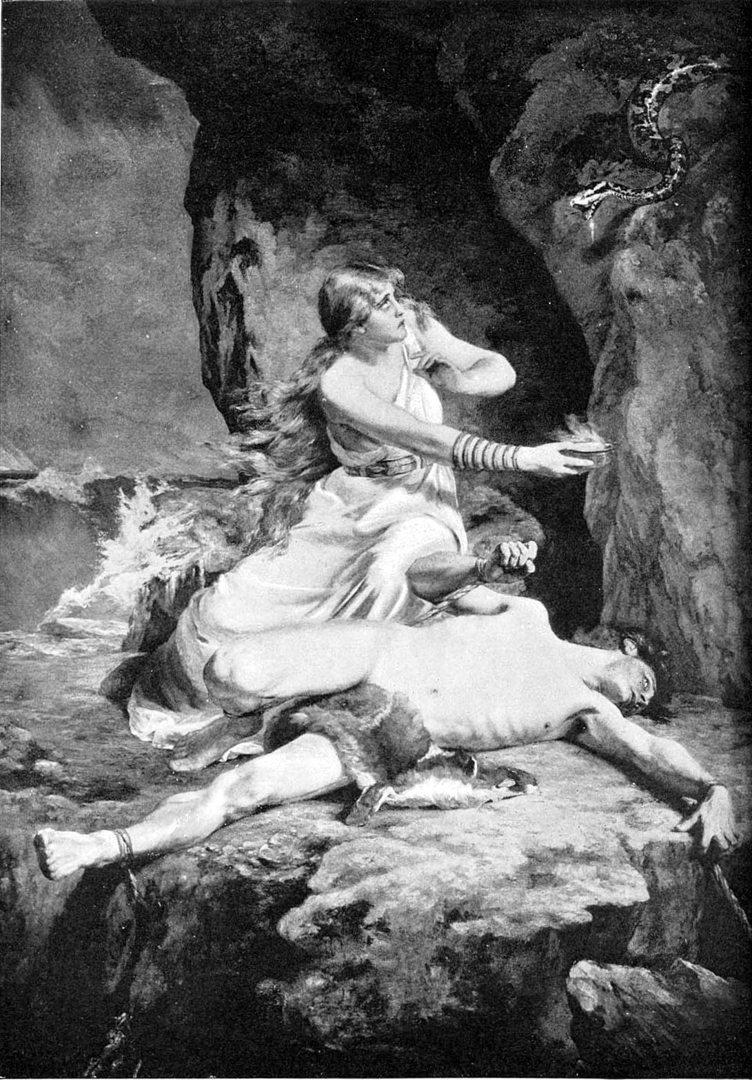 Loki and Sigyn during Loki's punishment